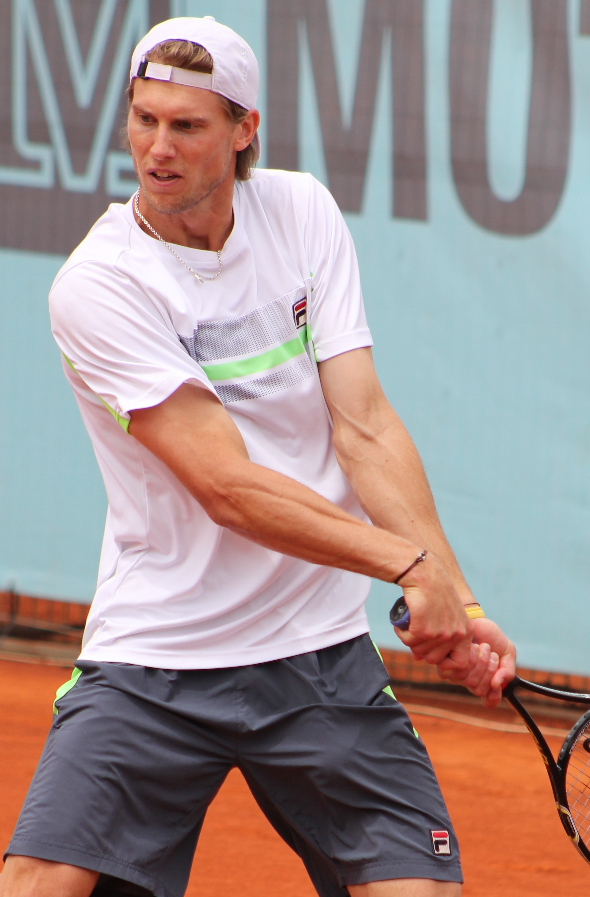 Seppi MA14 (2)